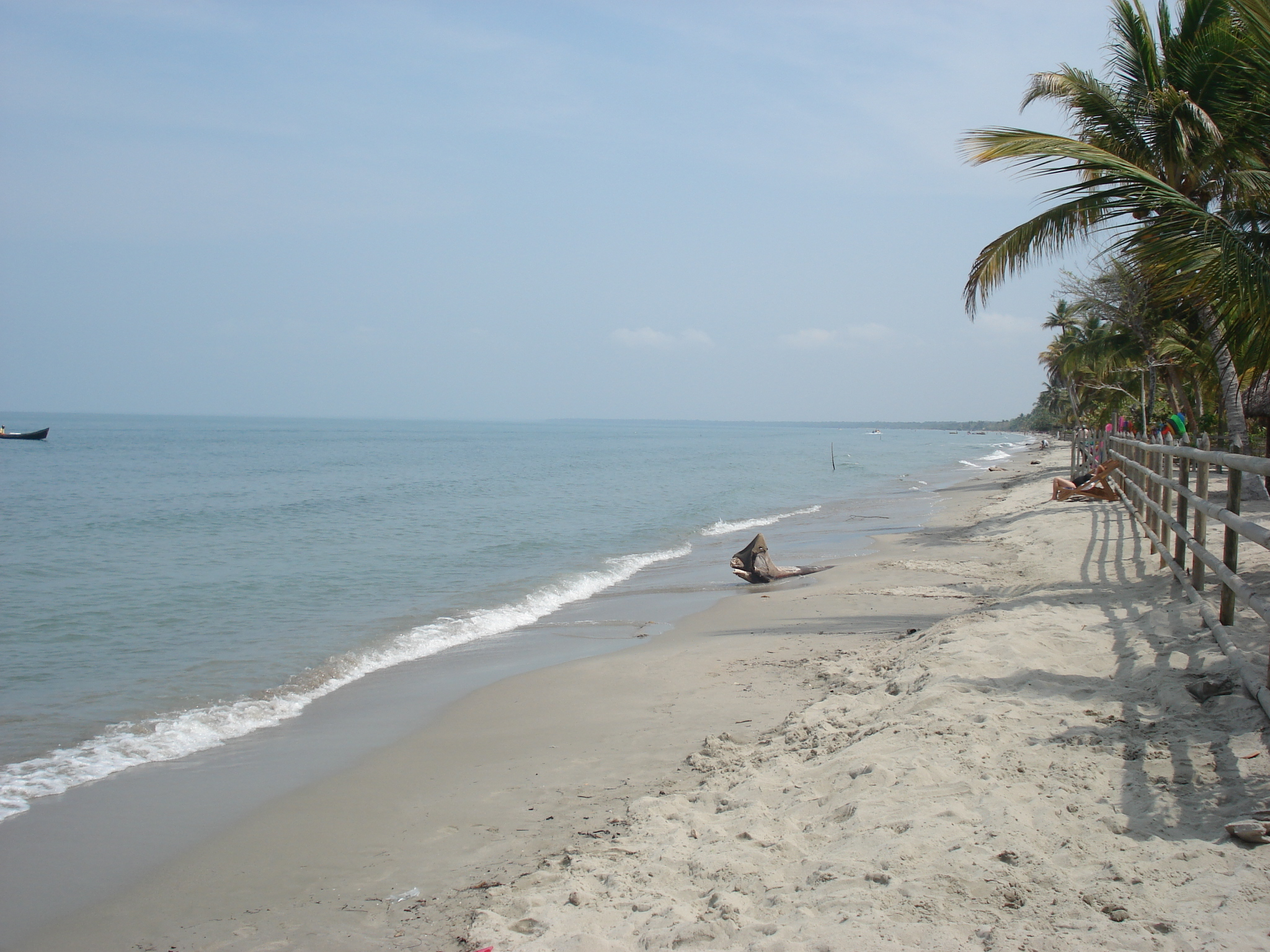 Playa en el sector El Francés, Tolú